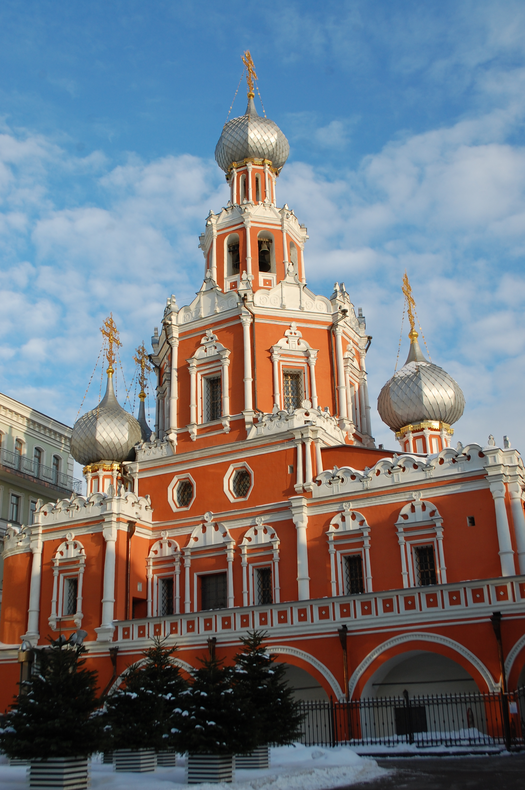 Церковь Знамения на Шереметьевом дворе: Романов пер., дом 2/6, строение 8, Арбат, Центральный округ, Москва